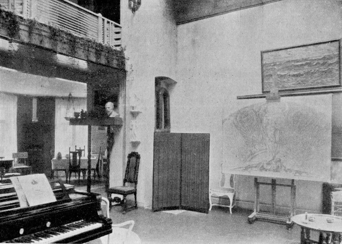 Ateljén i Villa Akleja